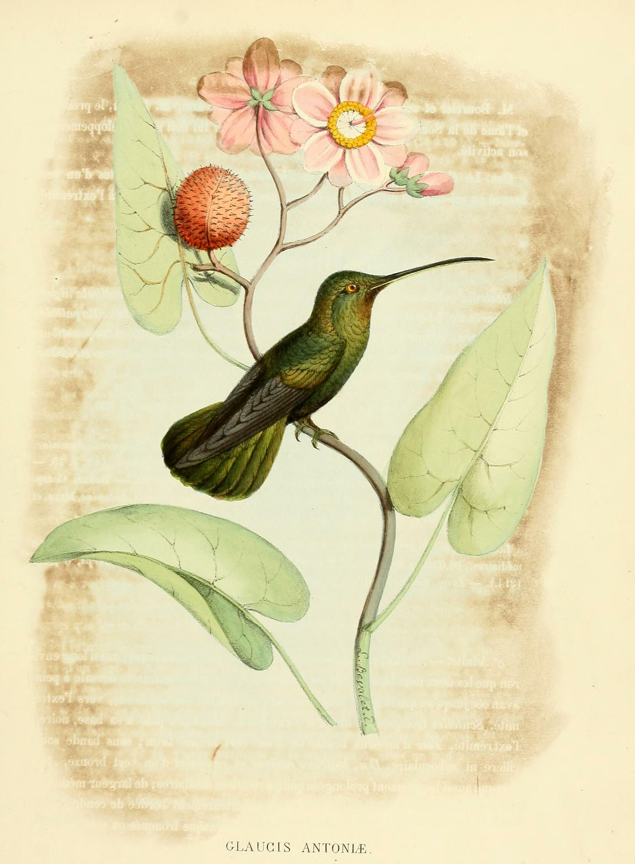 Glaucis antoniae = Threnetes niger niger[1]